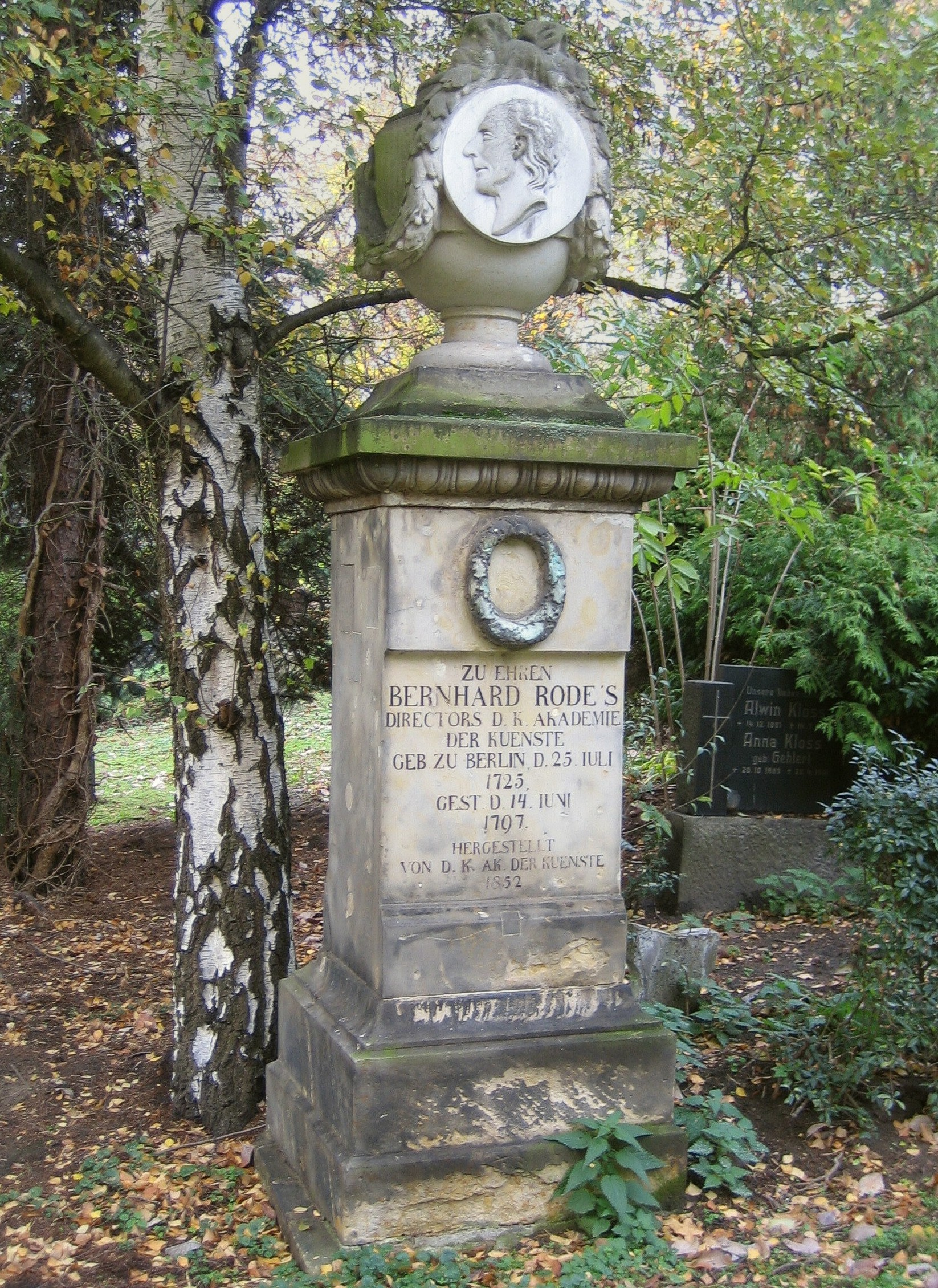 Grabmal des Berliner Malers Bernhard Rode (1725-1797). St. Marien- und St. Nikolai-Friedhof I, Berlin.